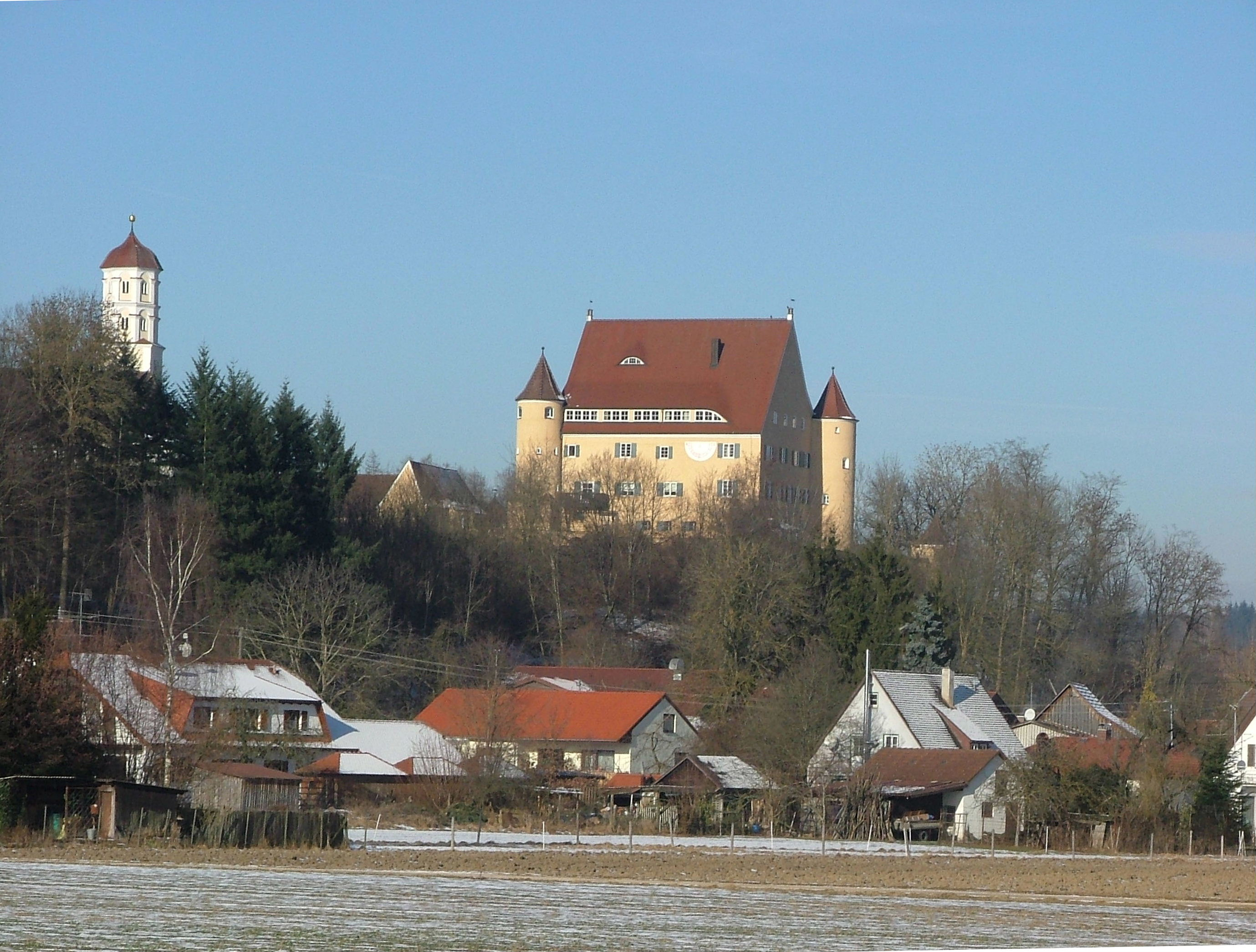 Balzheim